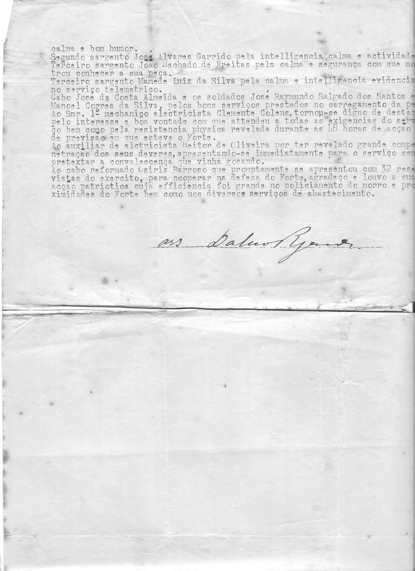 Rascunho da carta relatando o episódio entre a Fortaleza de Santa Cruz da Barra, em Niterói, no estado do Rio de Janeiro e o Encouraçado São Paulo - Pág. 2 de 2